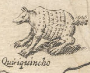 Quirquincho que aparece en el mapa de la obra de Alonso de Ovalle